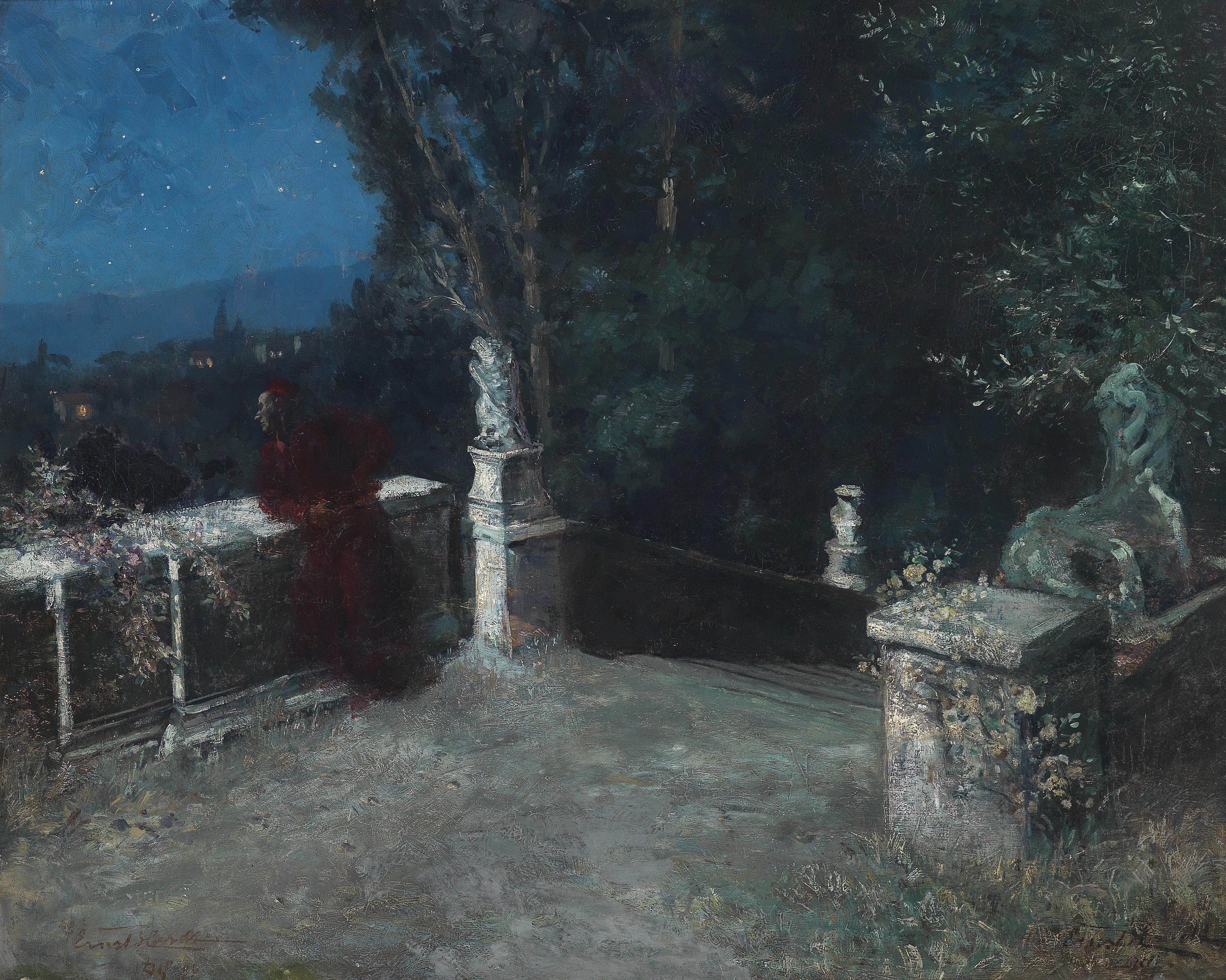 Blick auf eine Stadt bei Mondschein, signiert, bezeichnet Ernst Hardt Ddf, Öl auf Leinwand, 65,5 x 78,5 cm